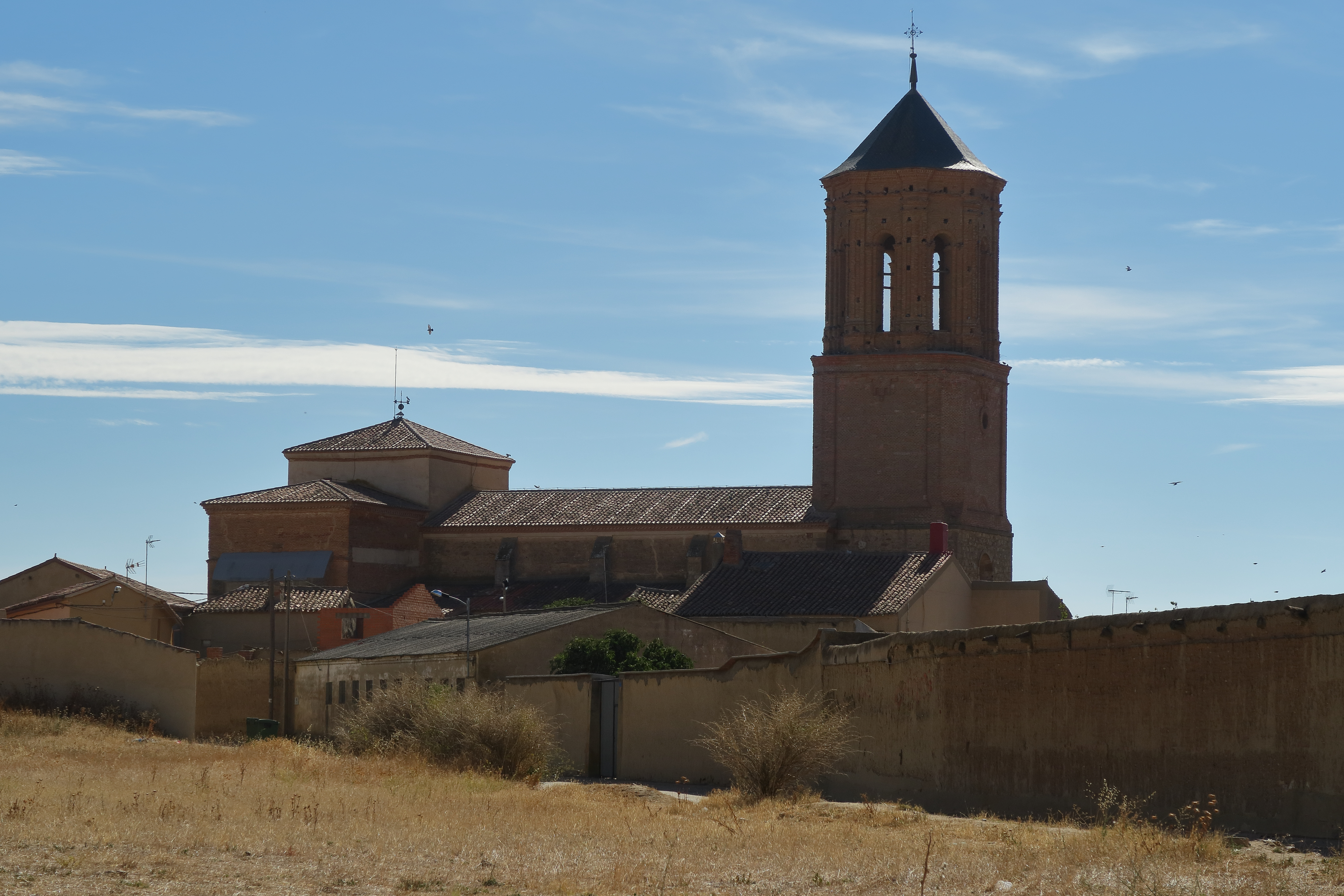 Villarrín de Campos, Iglesia de la Asunción de Nuestra Sra. 01